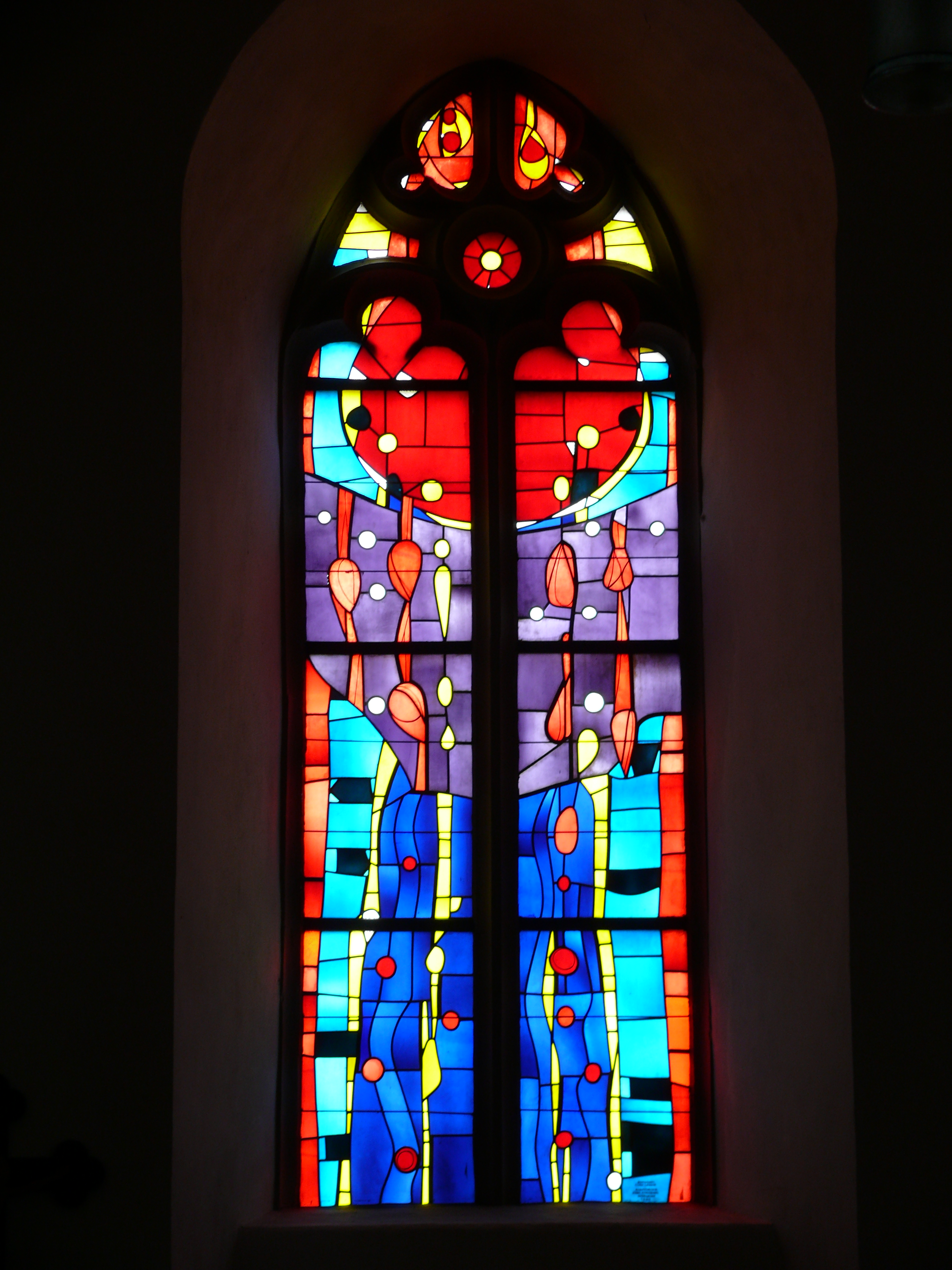 Pfarrkirche St. Bartholomäus Bergtheim; Blick zum Fenster des Turms